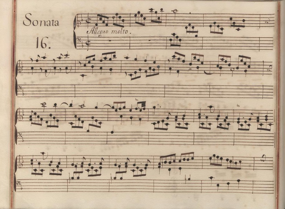 La sonate K. 469, telle qu'elle se présente dans le manuscrit de Venise, volume XI no. 16.